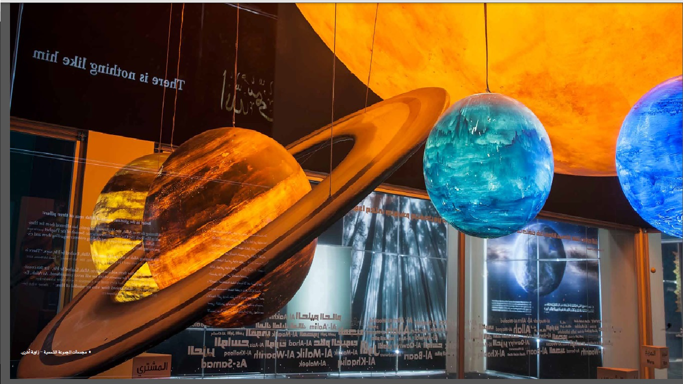 قاعة التعريف بالمعرض - المجموعة الشمسية في معرض أسماء الله الحسنى بالمدينة المنورة